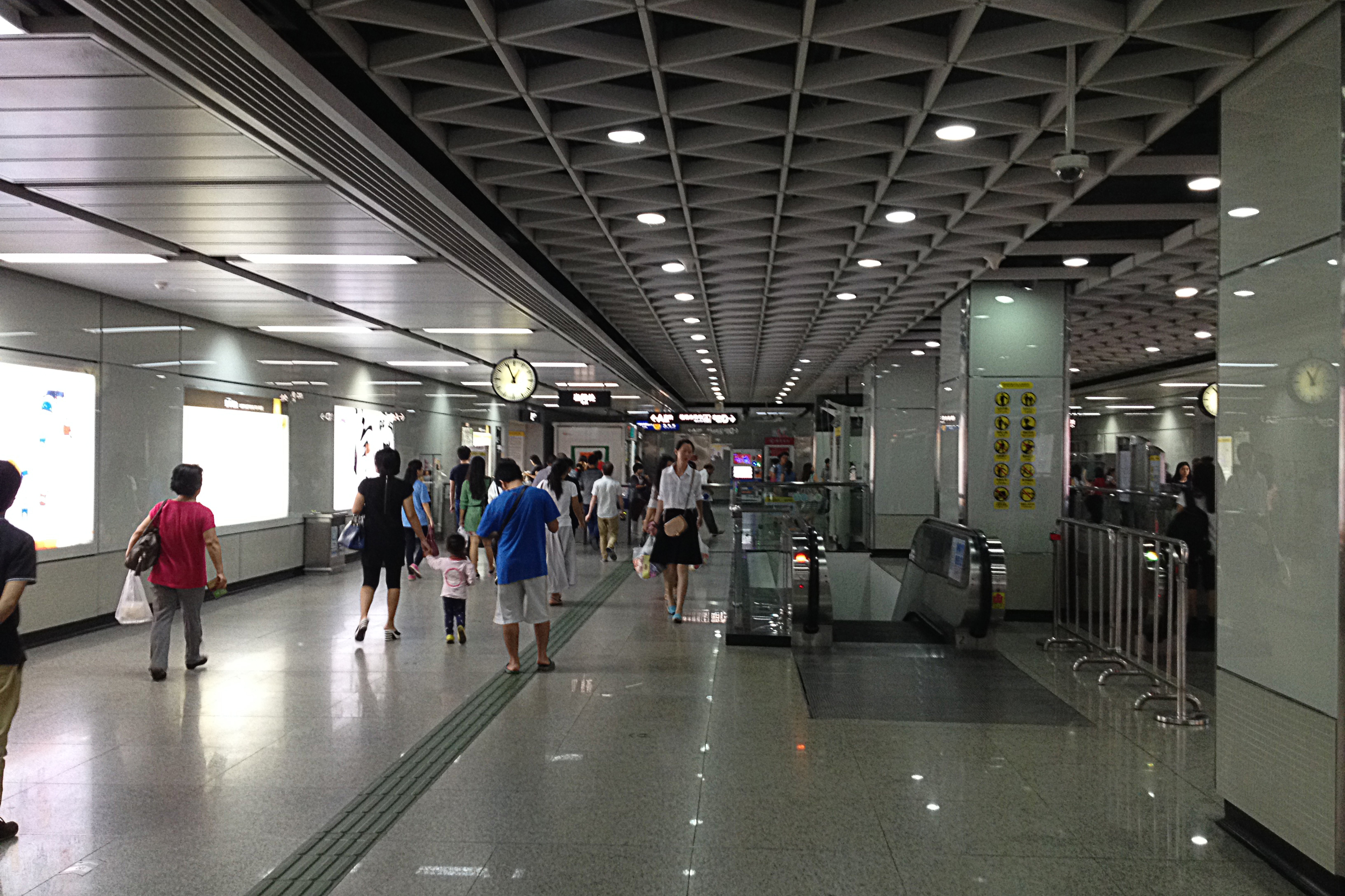 广州地铁文冲站站厅